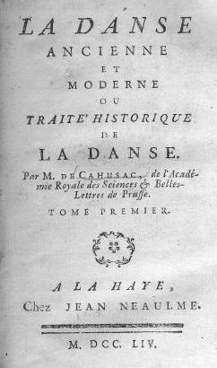 La danse ancienne et moderne ou Traité historique de la danse, Tomé 1 (Titre)